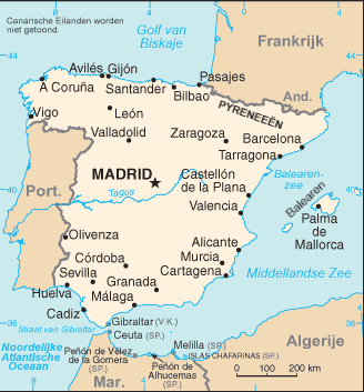 Nederlandse vertaling CIA-kaart